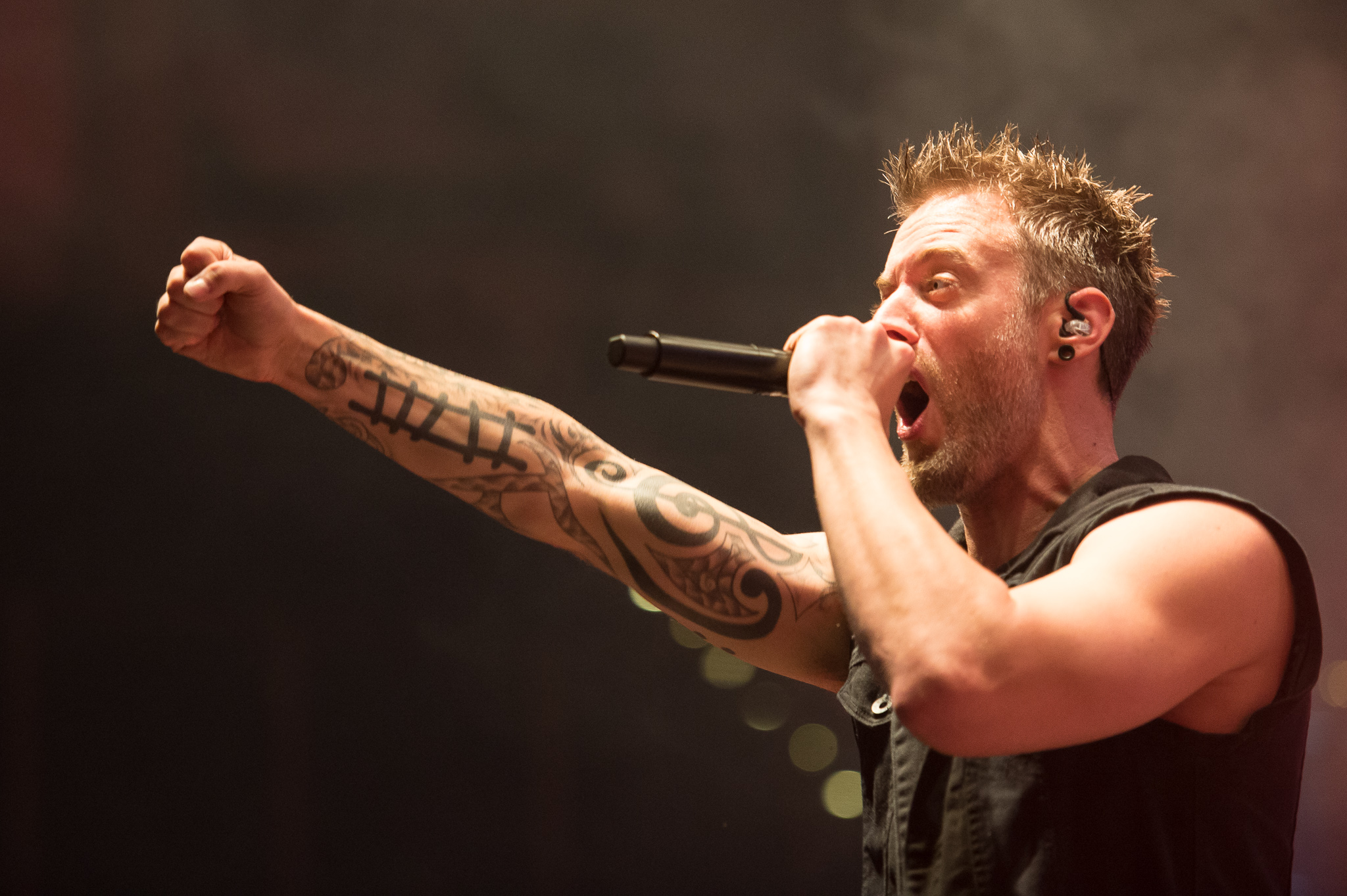 ARGO-Konzerte,Alternarena,Chris Musser,Festival,From Ashes To New,Konzert,Livekonzert,Livemusik,Musik,RiP,Rock im Park 2016